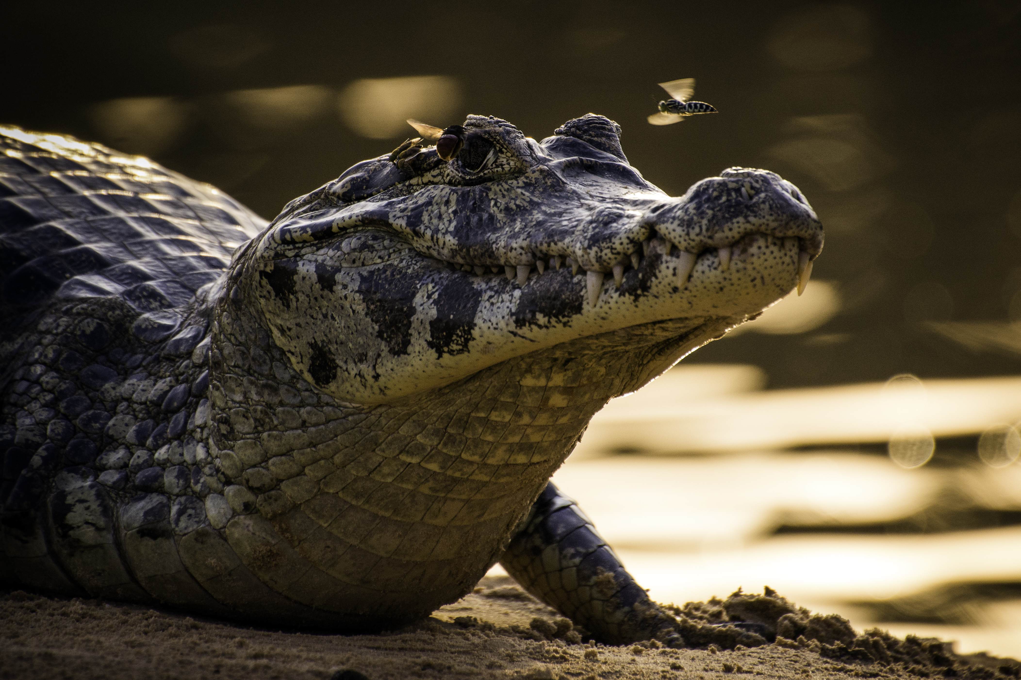 Jacaré no amanhecer do Porto Jofre, Pantanal.